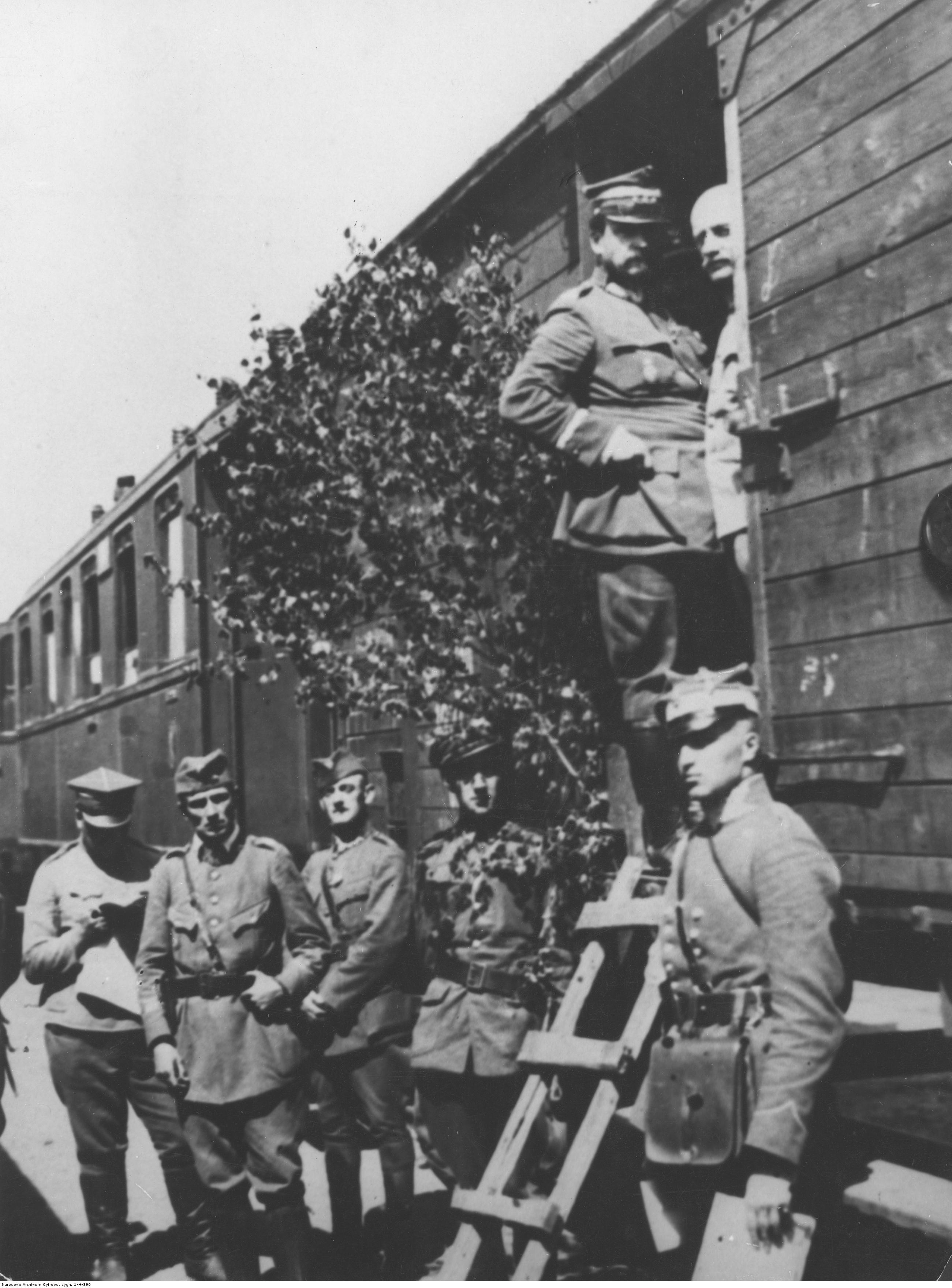 Wojna polsko-radziecka. Generał Józef Haller (w pociągu z lewej strony) w otoczeniu sztabu. Koncern Ilustrowany Kurier Codzienny - Archiwum Ilustracji. Sygnatura: 1-H-390